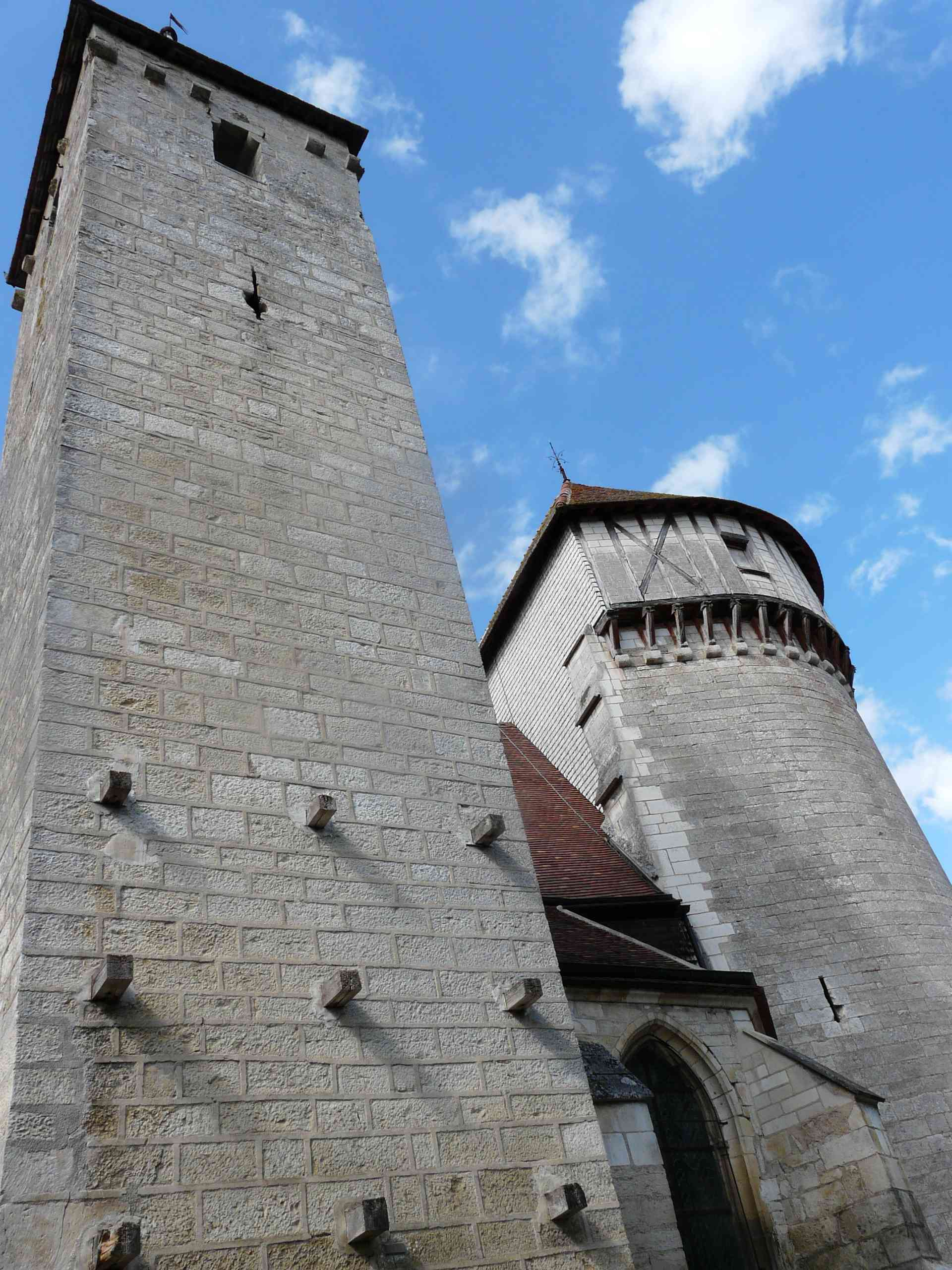 L'église fortifiée